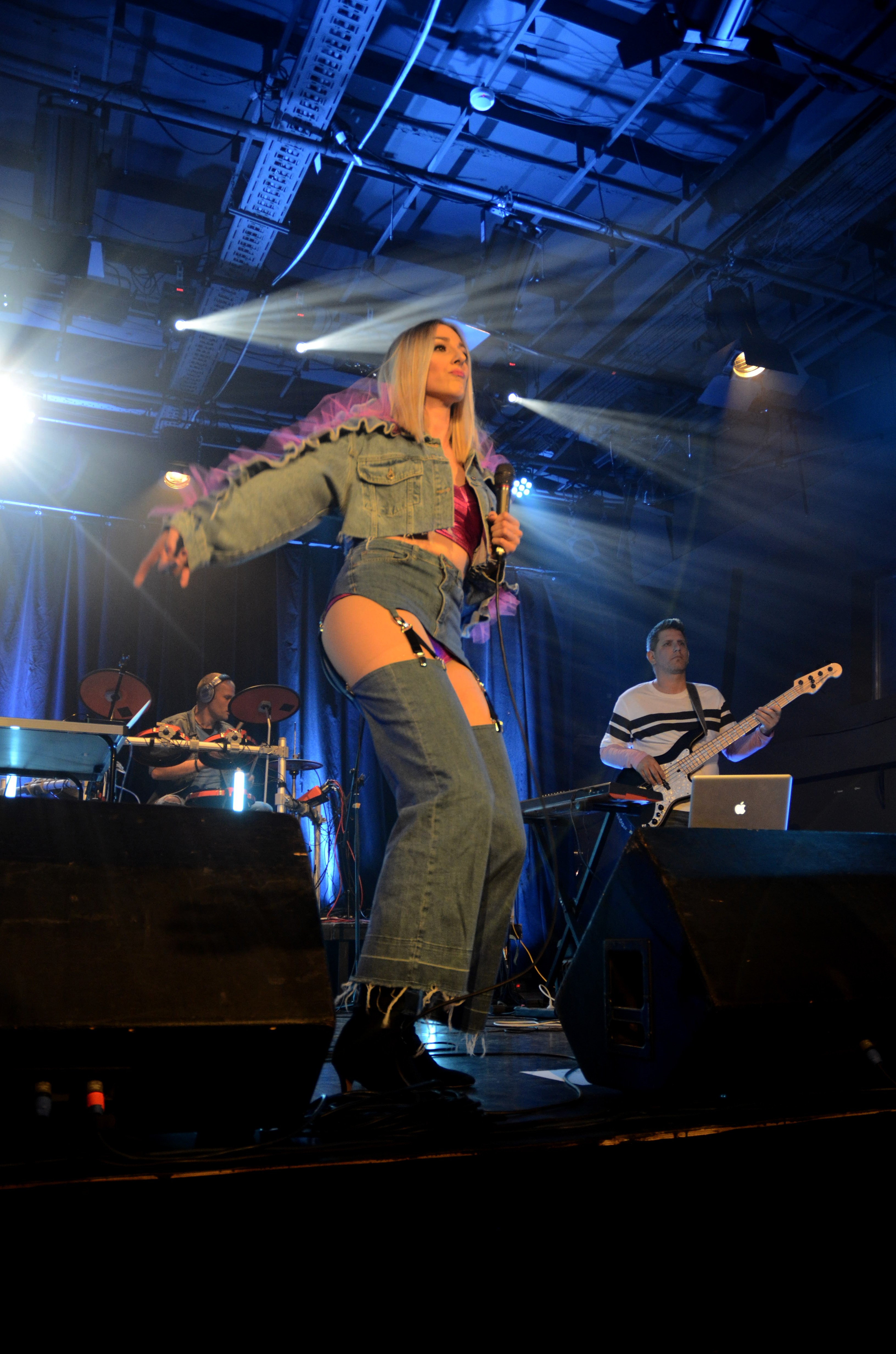 A kép Bartha István fotós munkája, a 2019-es MOVE album lemezbemutató koncertjén készült.